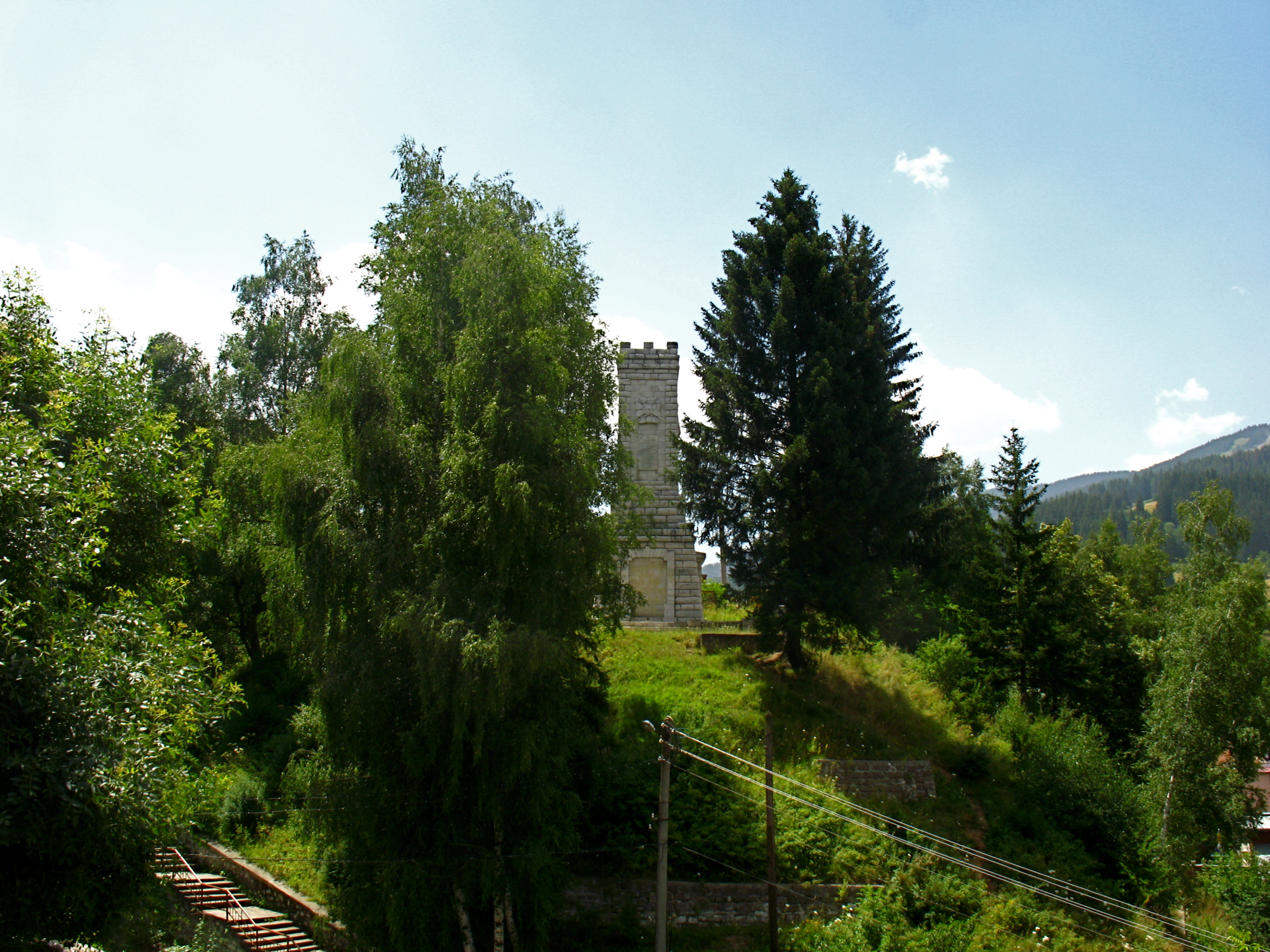 Паметник